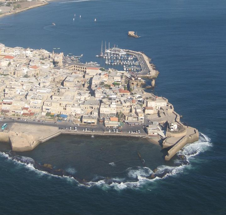 Acre